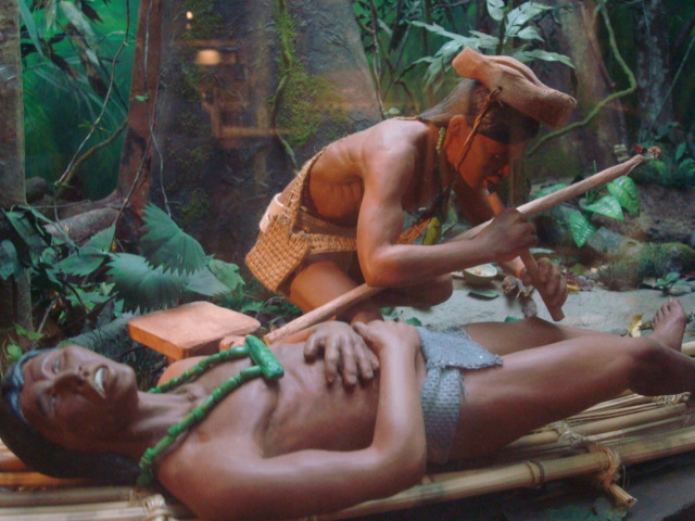 Diorama de un chamán curando a un enfermo. Museo del Jade, San José de Costa Rica.